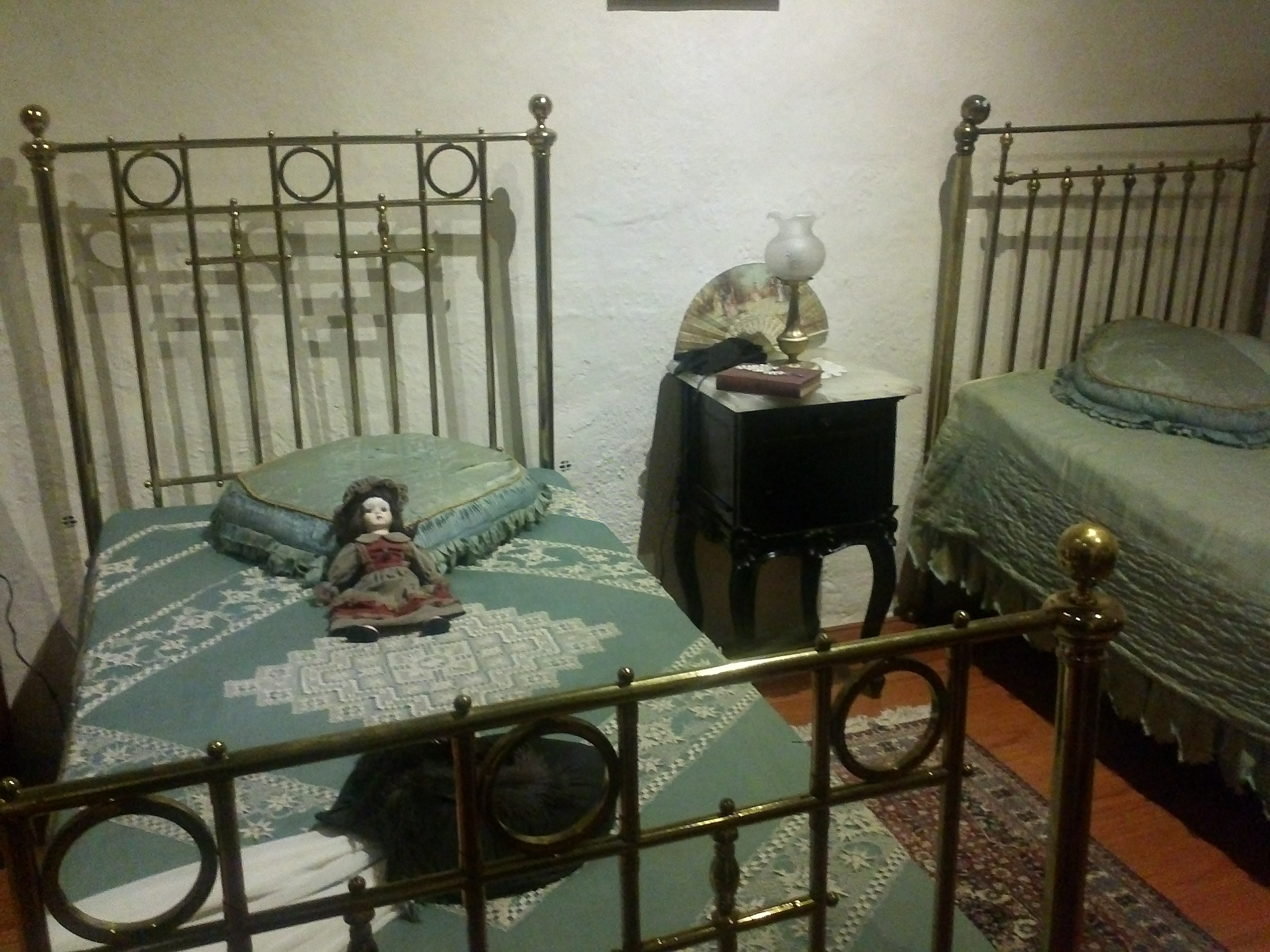 Recámara de la Casa de los Hermanos Serdán, Puebla